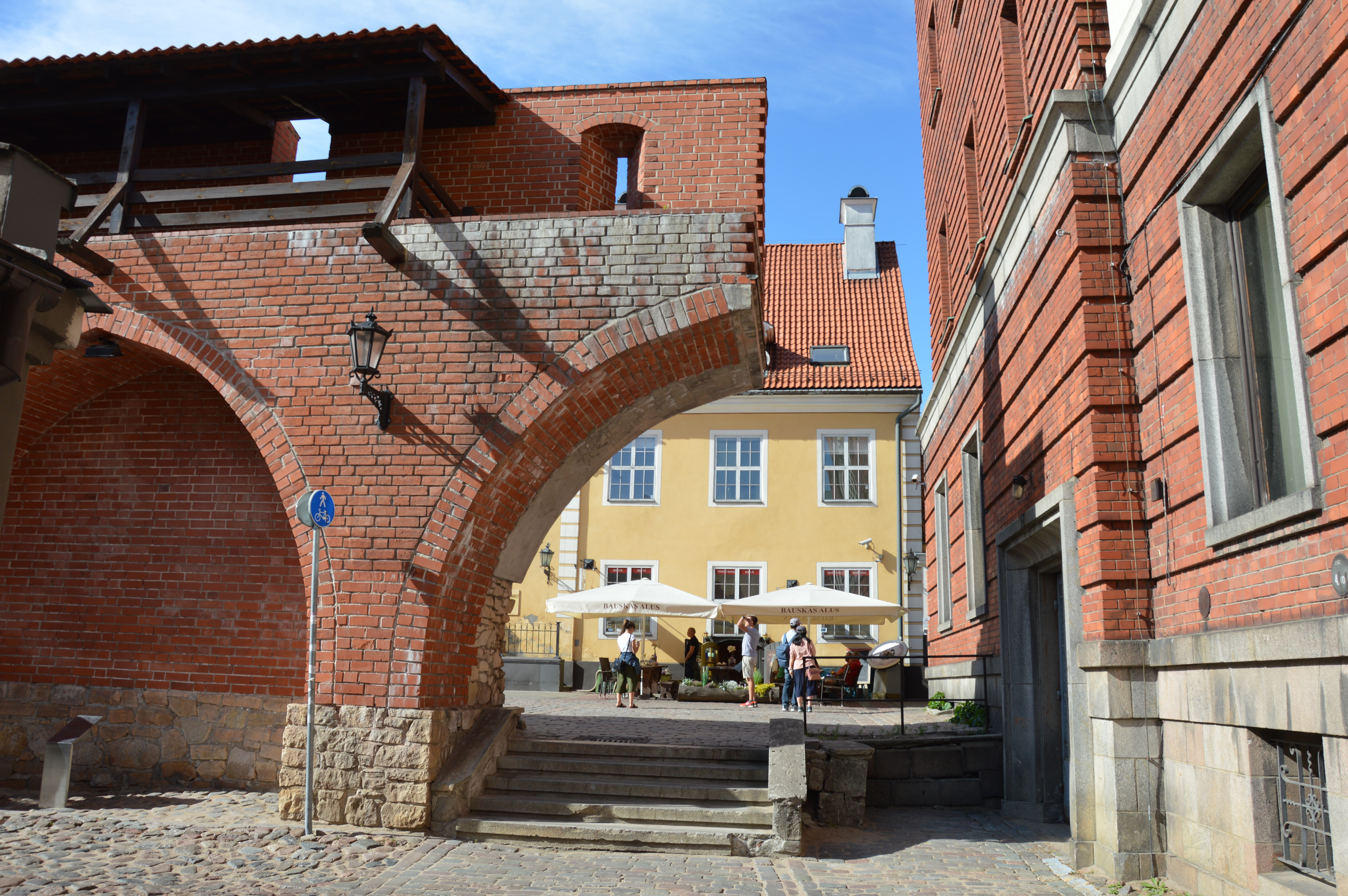 Ende der Stadtmauer in Riga 2018, Nähe des Pulverturms